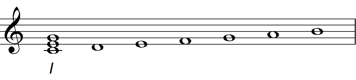 Acorde tríada formado sobre el I grado de la Escala Mayor de Do